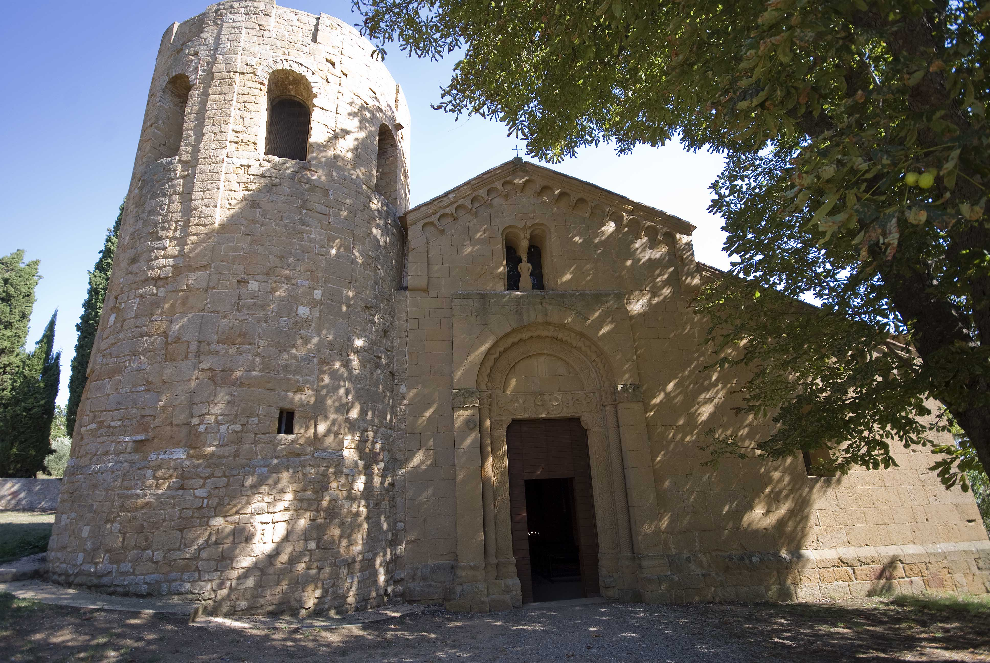 facciata della pieve dei santi vito e modesto - Pienza